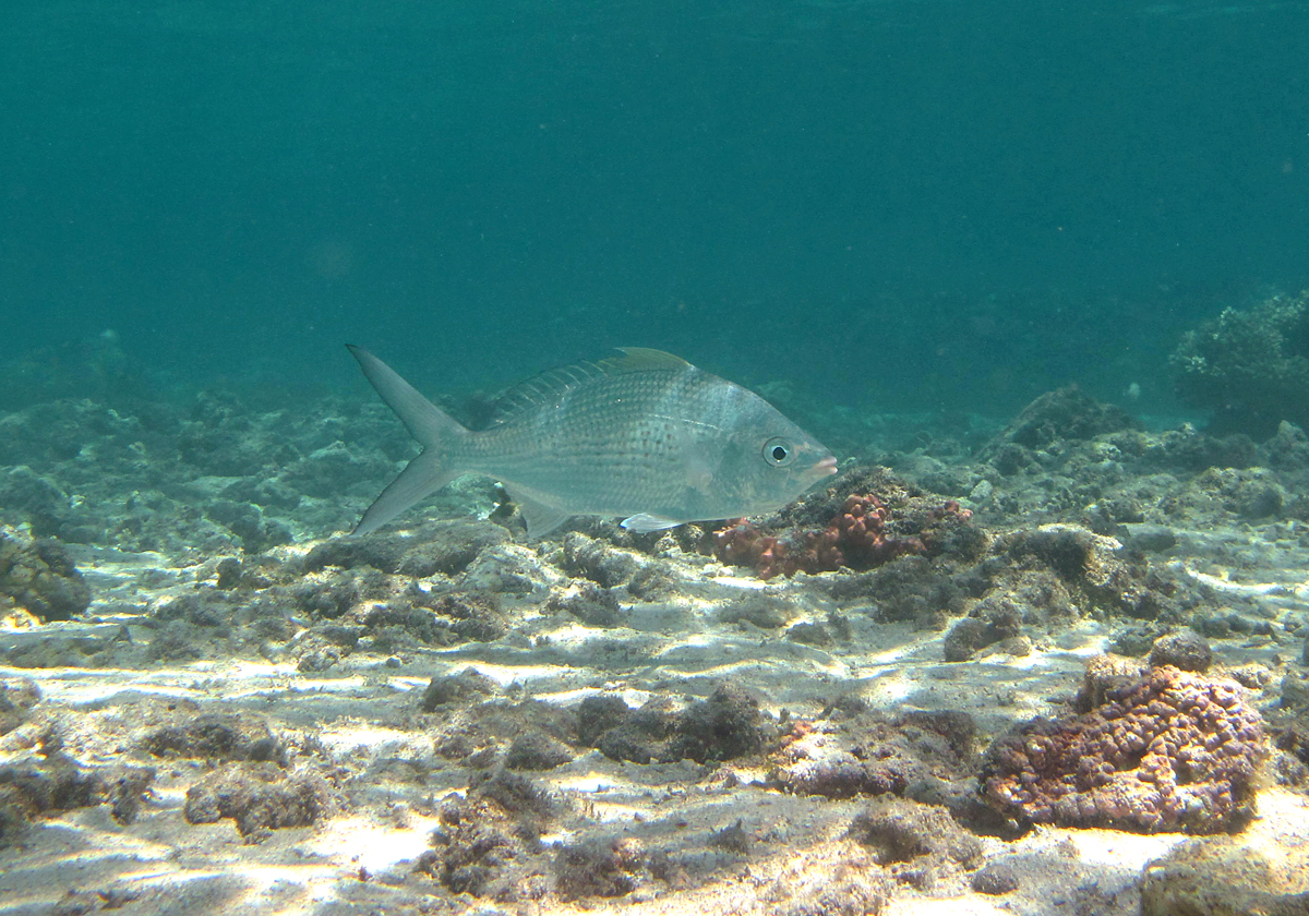 Une gerre (Gerres longirostris) à la Réunion.